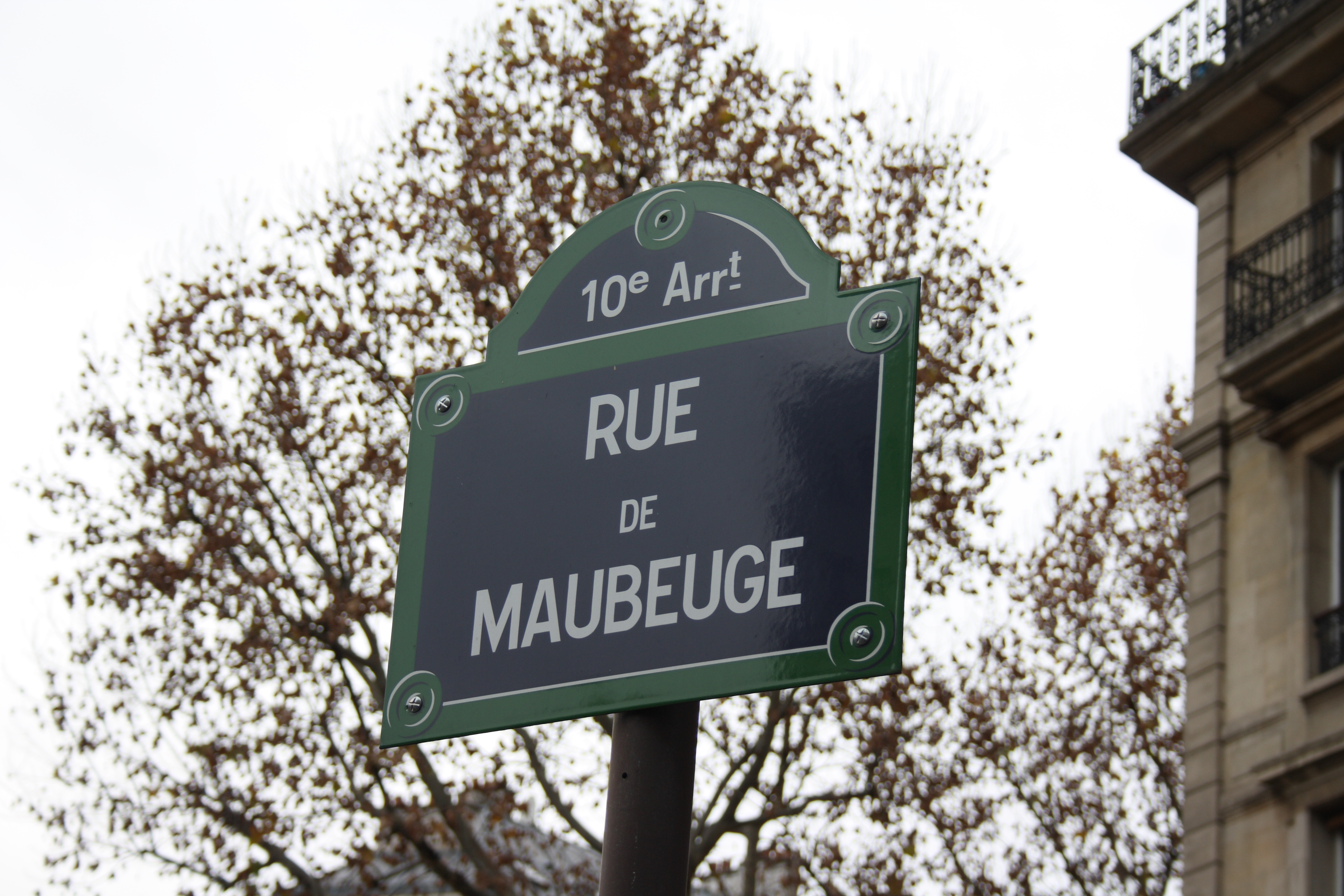 Straßenschild RUE DE MAUBEUGE im 10. Arrondissement von Paris